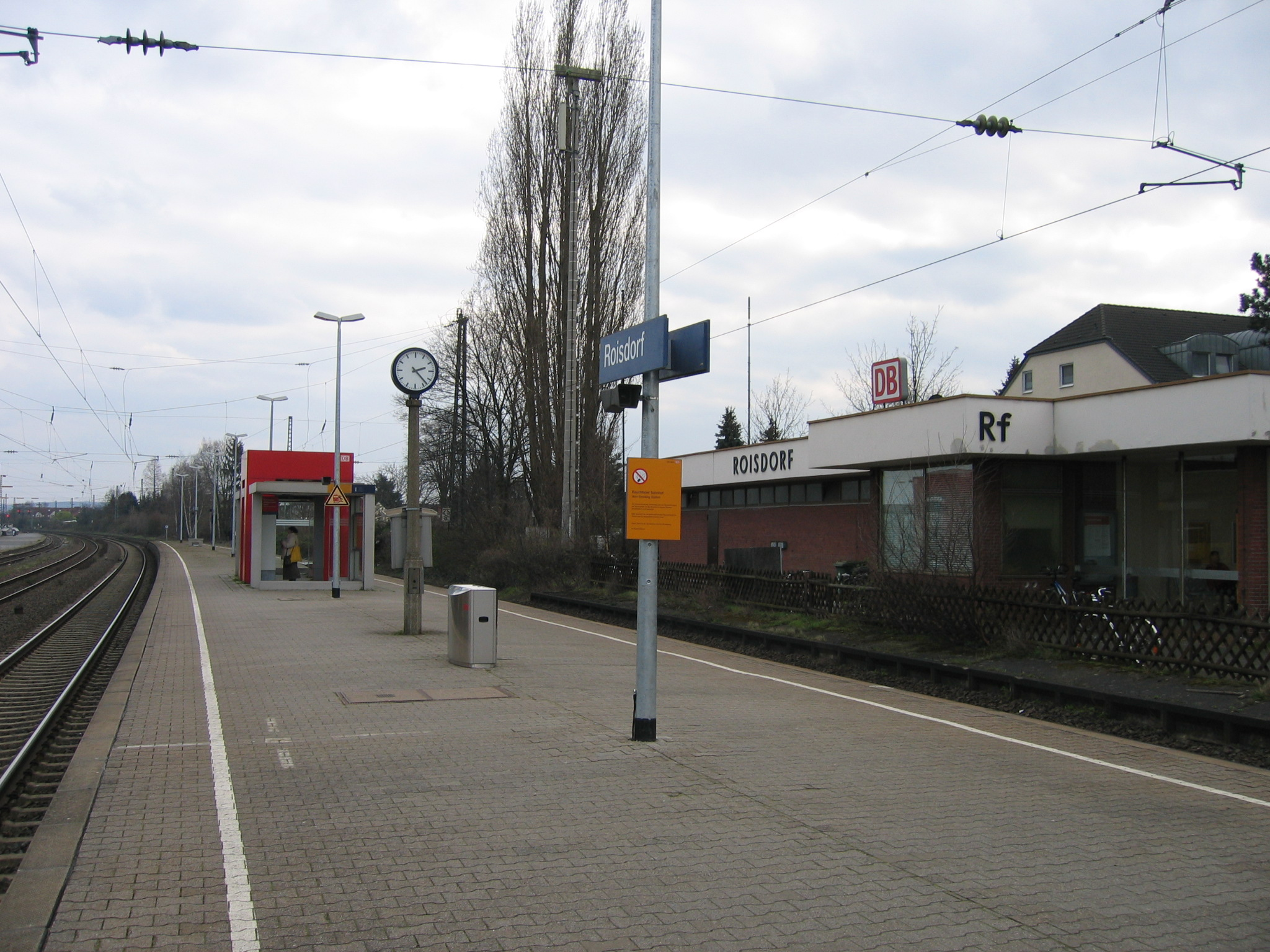 Bahnhof Roisdorf